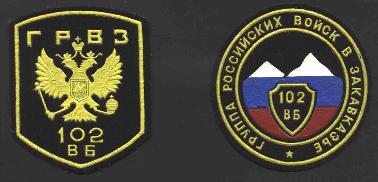 Шеврон 102-й российской военной базы